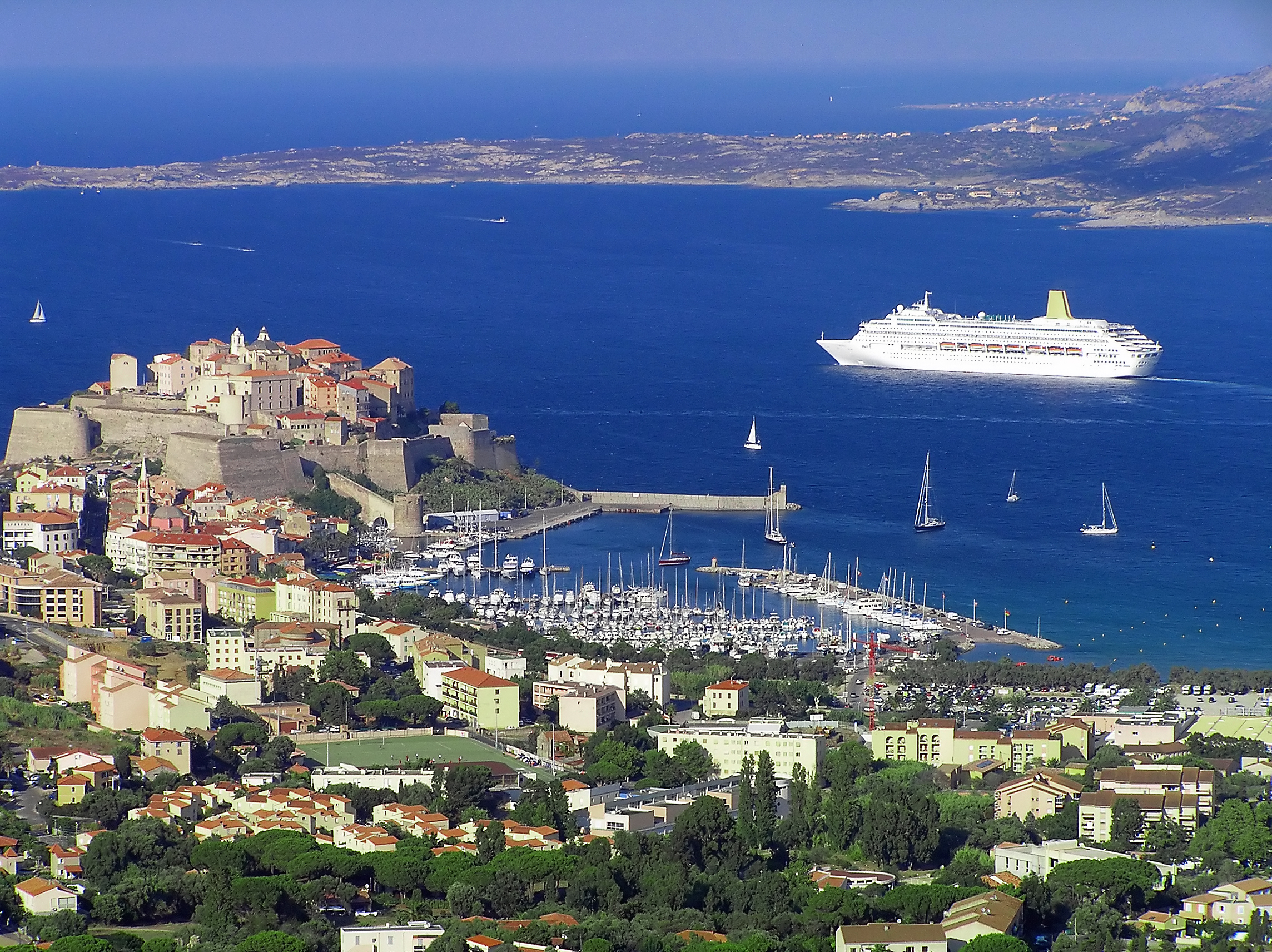 Vue générale de Calvi